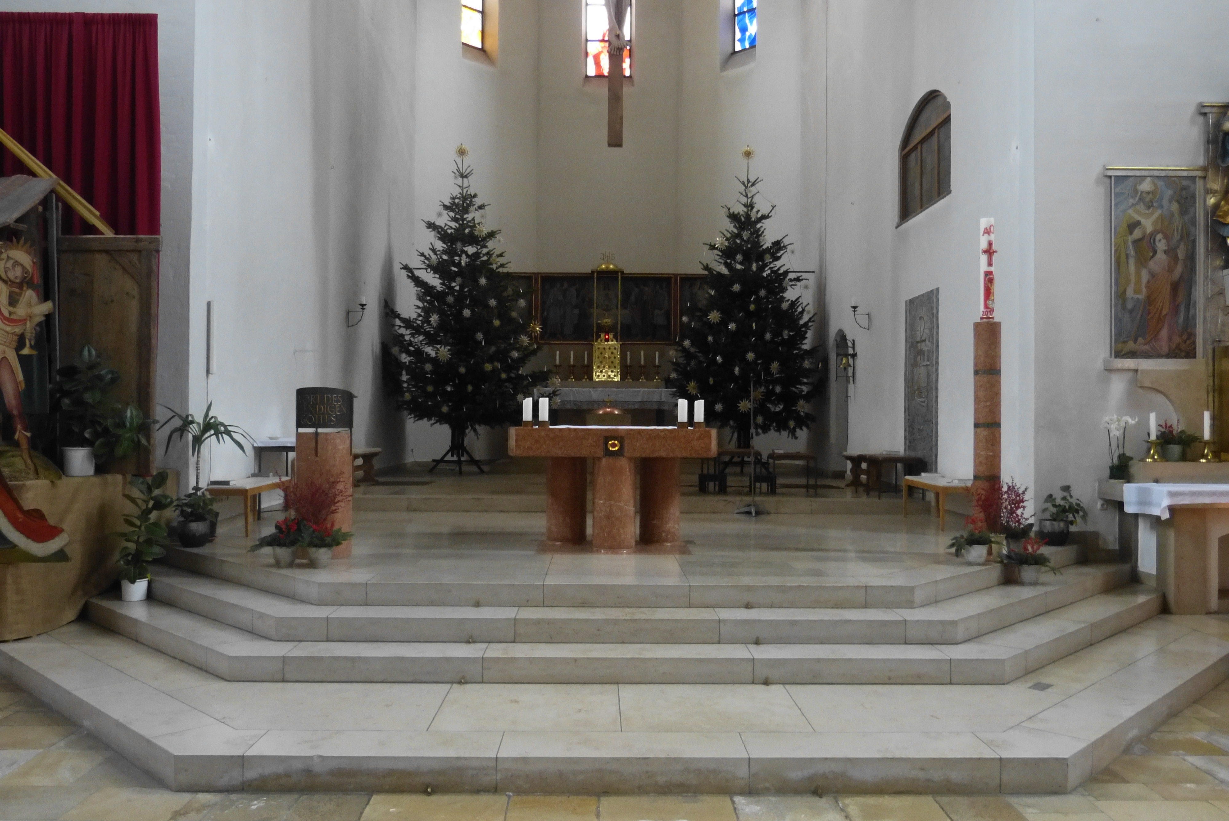 Altar in der Kirche Heiligste Dreifaltigkeit (Augsburg-Kriegshaber)